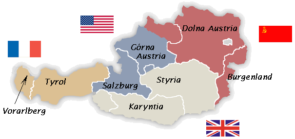 Strefy alianckie w Austrii